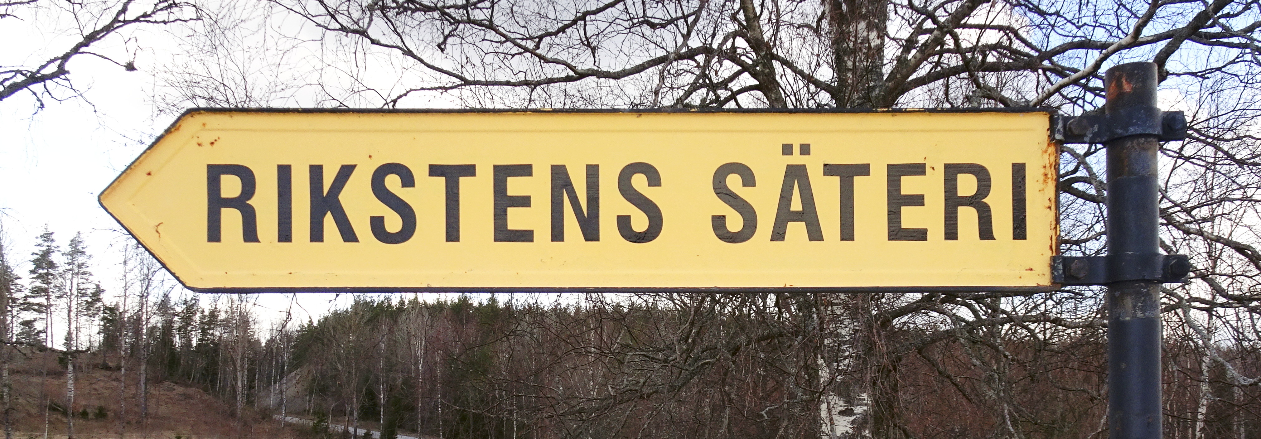 Rikstens säteri skylt